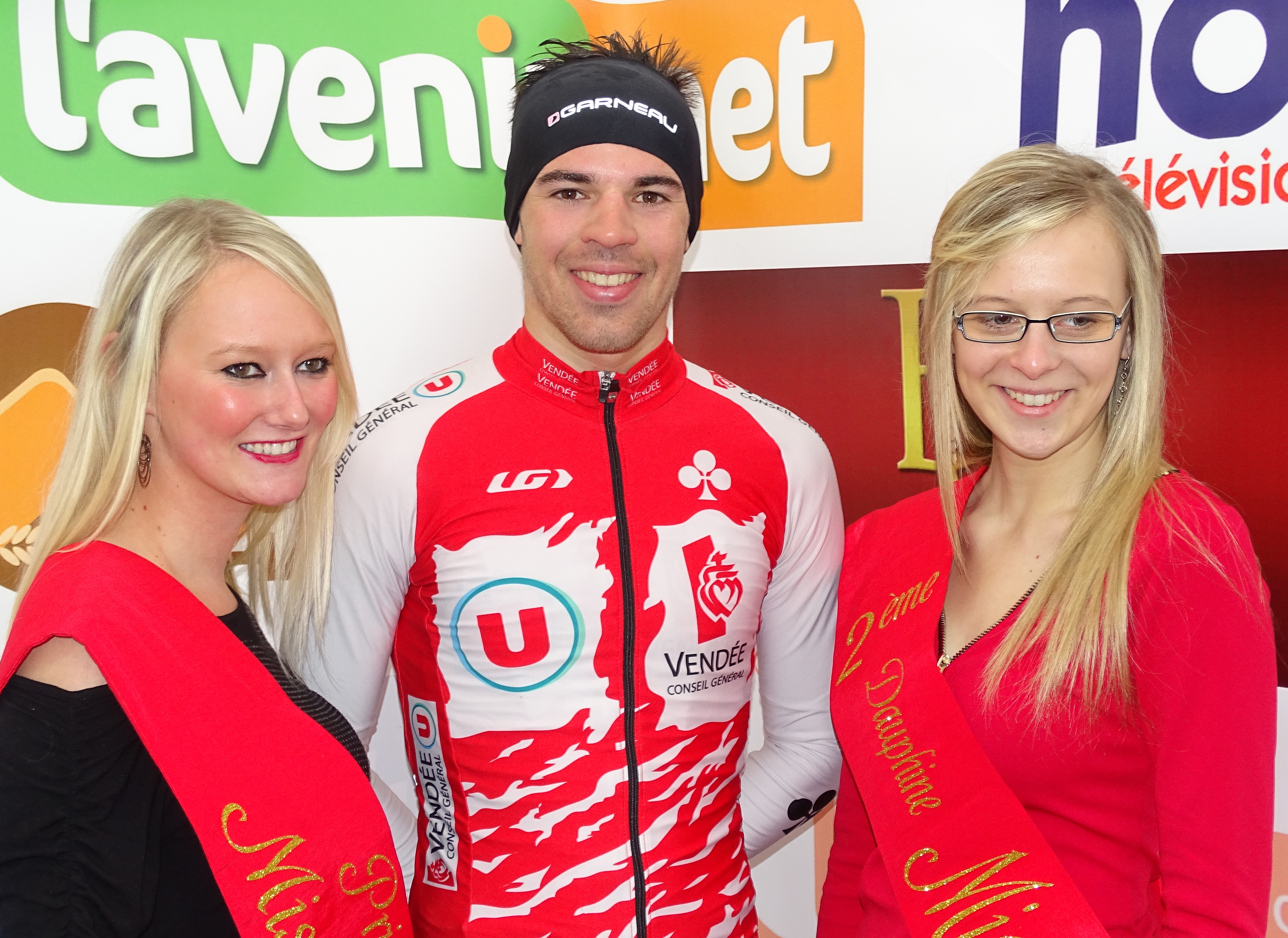 Triptyque des Monts et Châteaux 2015 Depicted team: Vendée U